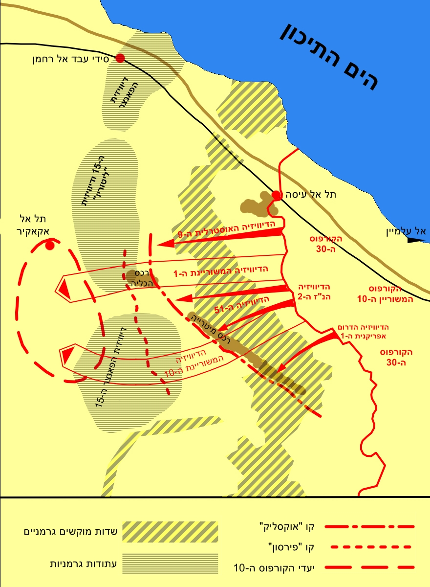 מפת קרב אל עלמיין השלישי